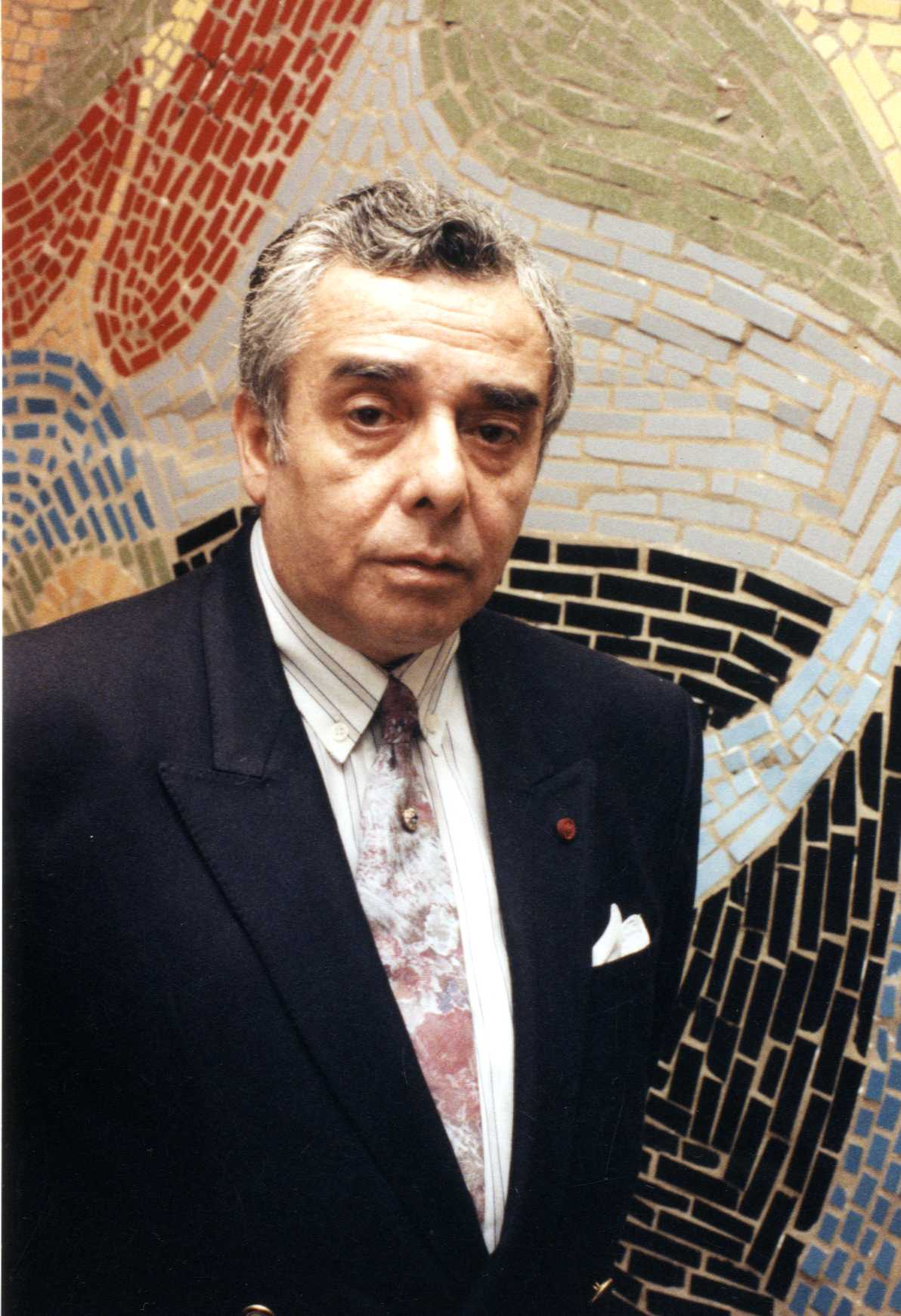 Foto de Patricio Pizarro